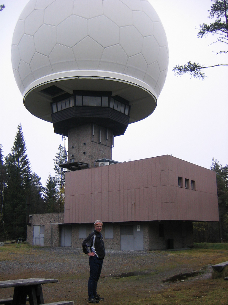 357 moh, men liten utsikt fra bakken. I dag er tårnet benyttet mest til radar for fly. "Soppen" kan sees fra mange steder i Oslo.